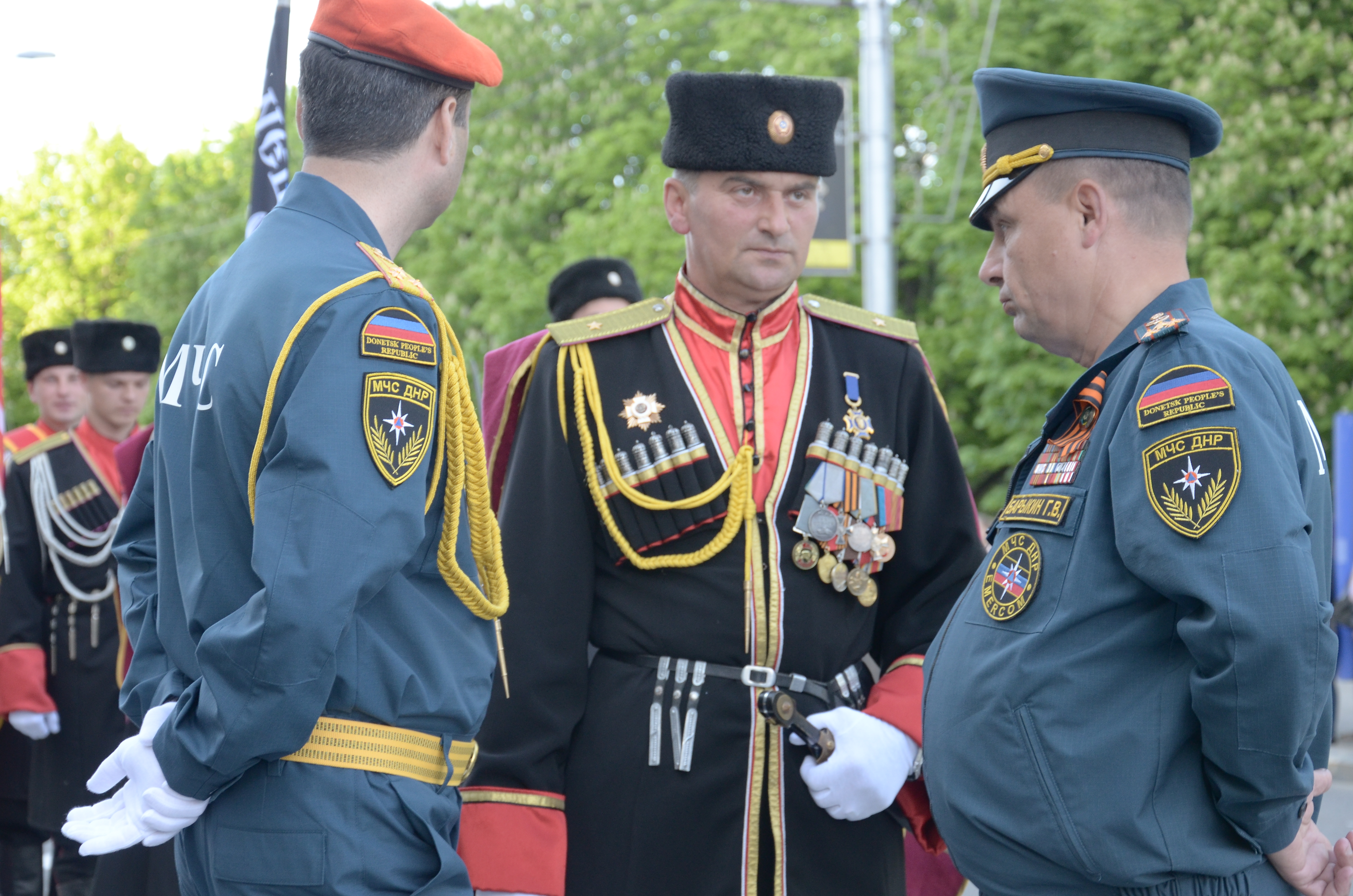 Репетиция парада в честь дня Победы в Донецке